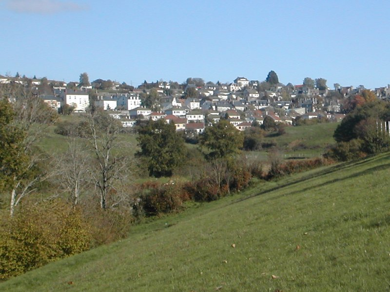 La vue de la ville de Mauriac (Cantal, France) du lac du Val Saint Jean.